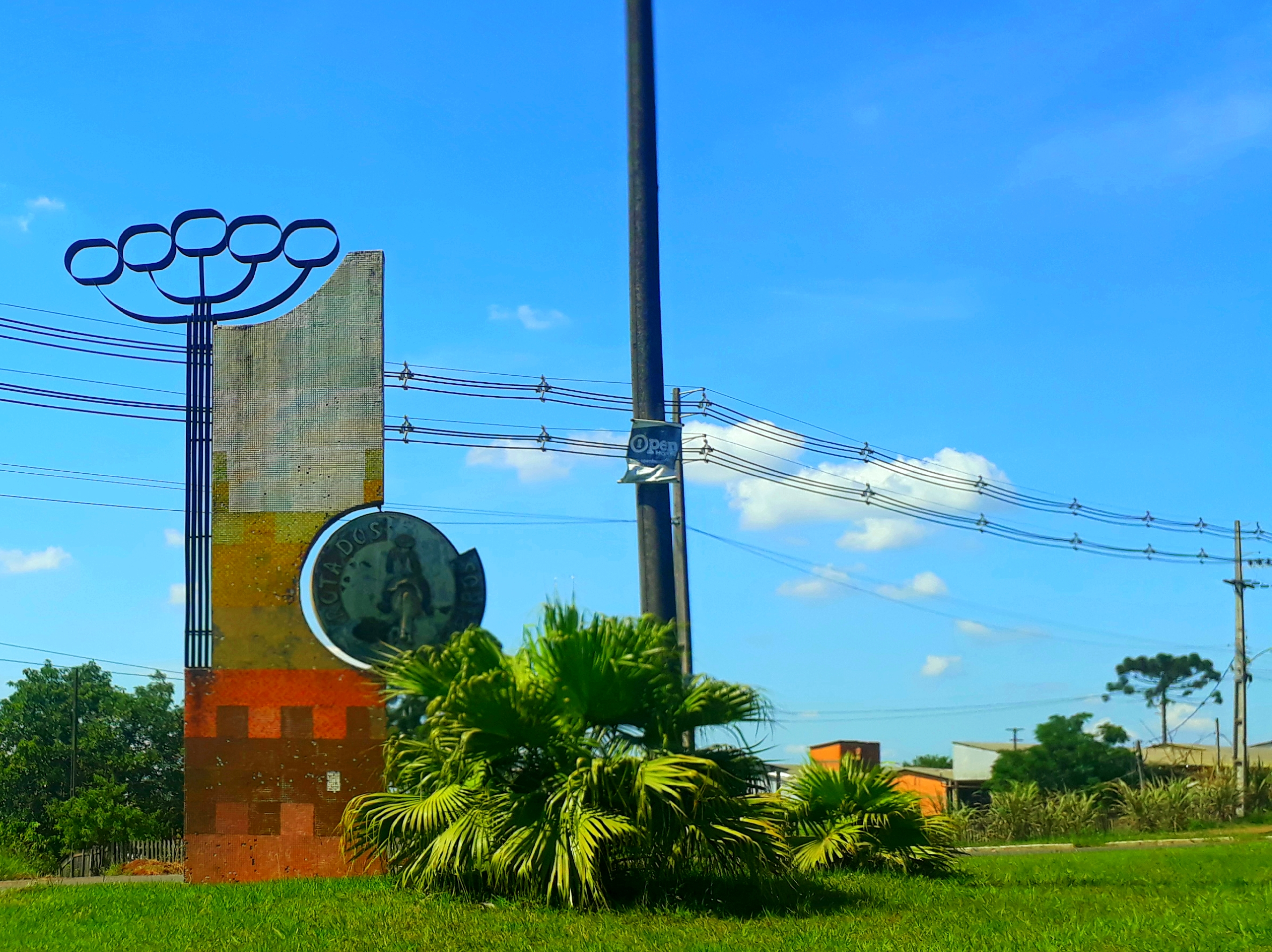 Monumento Rota dos Tropeiros, na localidade de Triângulo, no trevo de acesso à Telêmaco Borba, no Paraná.